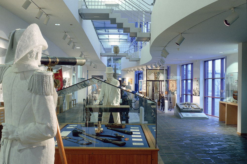 Blick in die Dauerausstellung des Historischen Museums Bremerhaven.